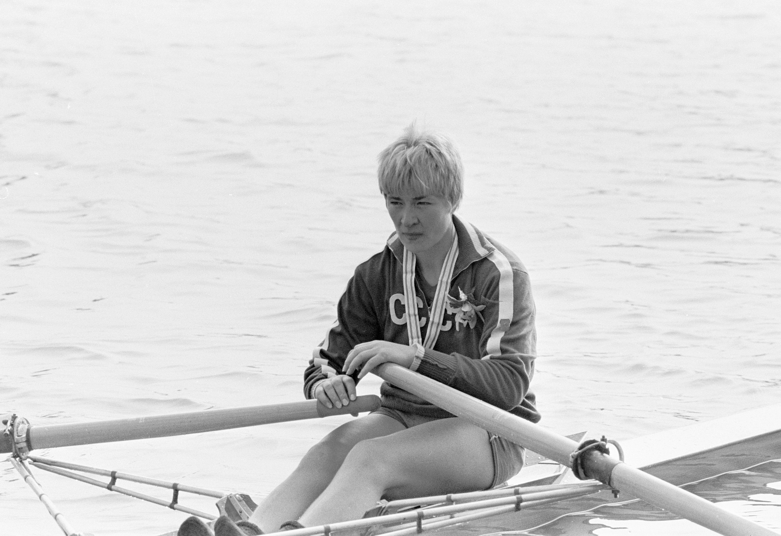 Europese Roeikampioenschappen dames 1966, Galina Konstantinova met medaille en bloem, winnares nummer skif